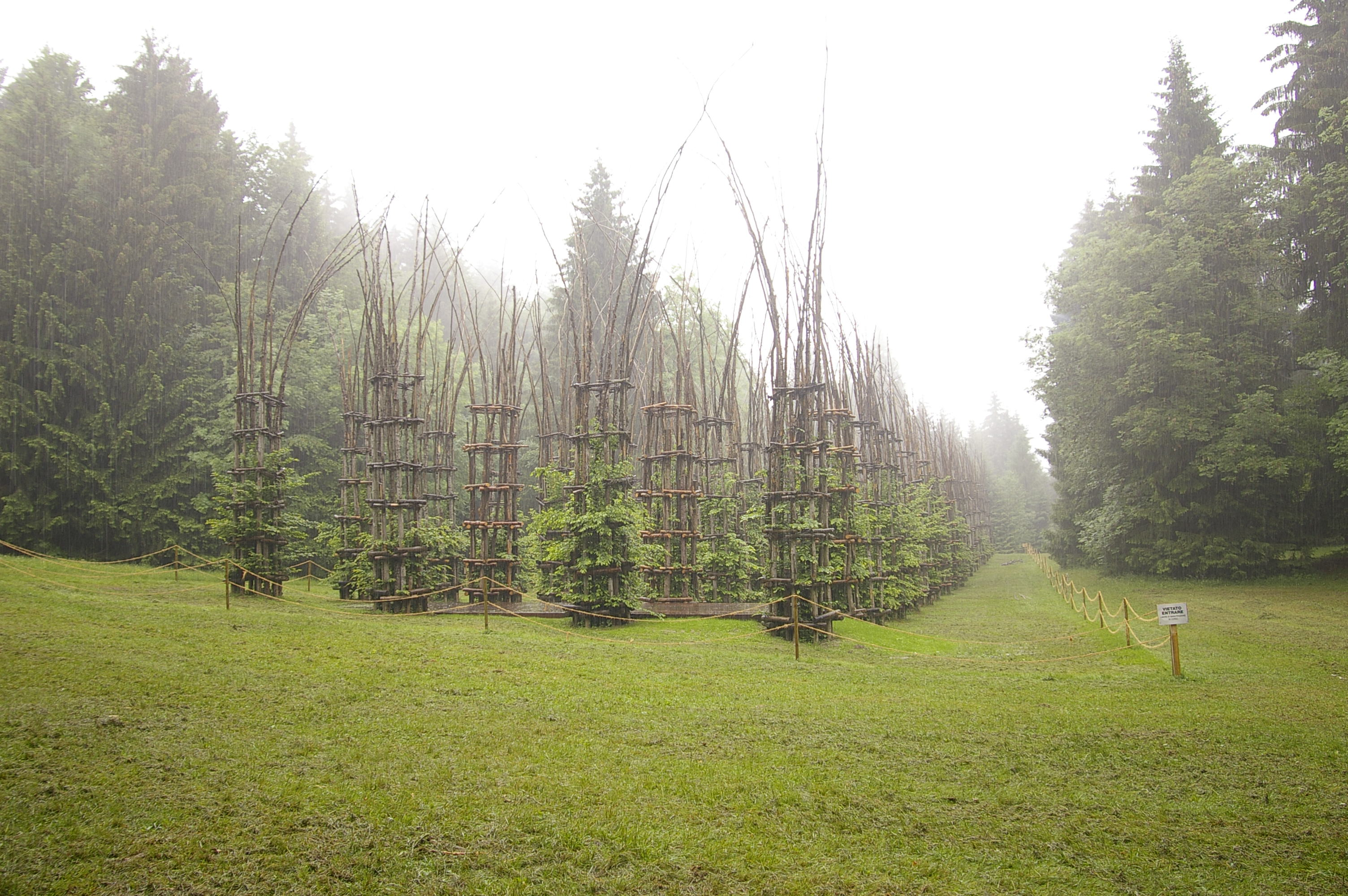 Arte Sella "Cattedrale Vegetale" di Giuliano Mauri, 2002. ubicata nei pressi di Malga Costa, realizzata con artifici naturali che indirizzano la crescita delle piante, le piante crescono circa 50cm l'anno, quando gl'alberi saranno indipendenti gli artifici marciranno. dimensioni: d tre navate formate da ottanta colonne di rami intrecciati, altezza 12 metri con tronco di diametro 1 metro; rettangolo di base di 82 metri per 15, un' altezza di 12 metri e copre un' area di 1.230 metri quadrati.